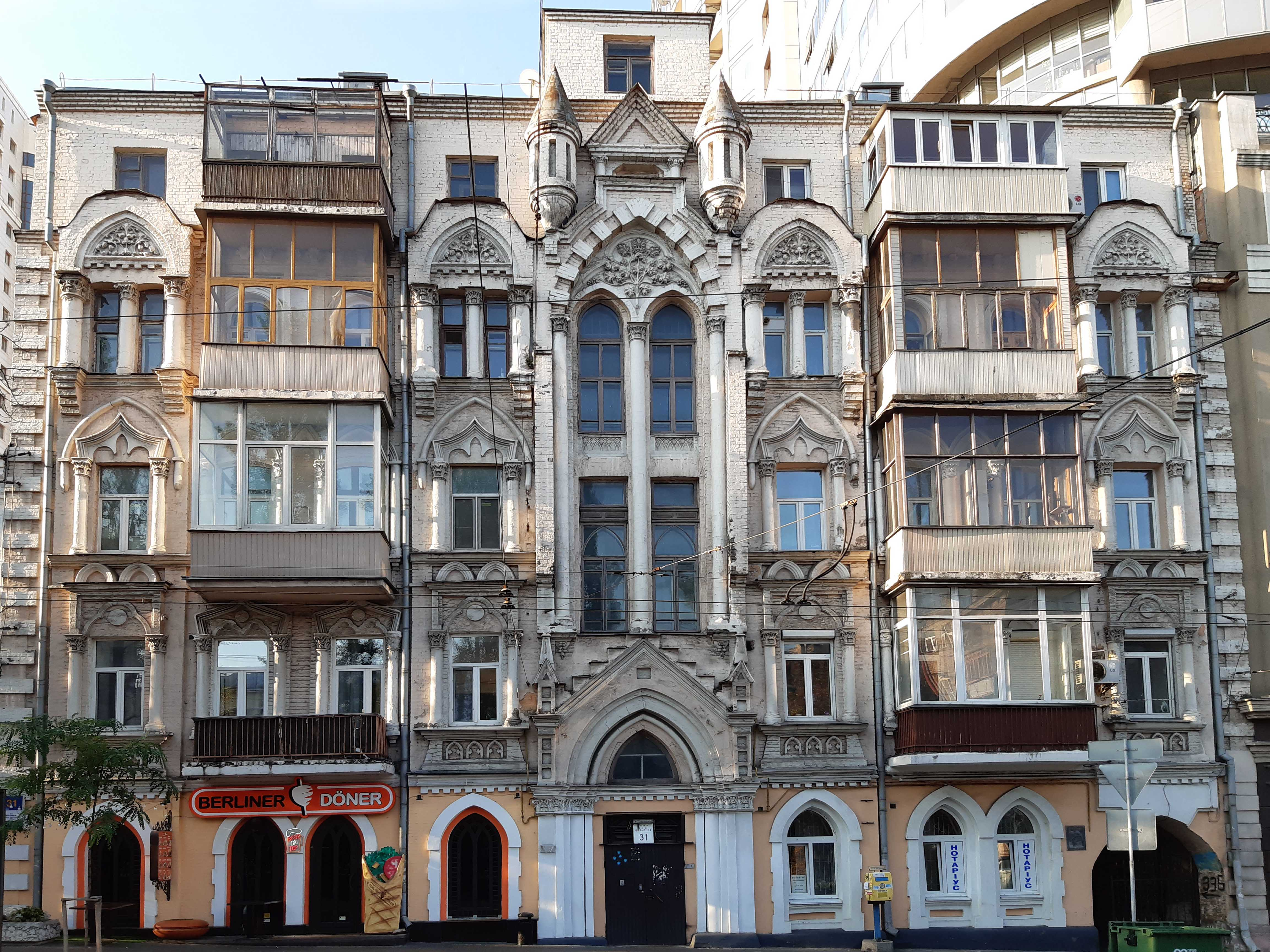 Прибутковий будинок, 1903, бульвар Тараса Шевченка, 31, Київ